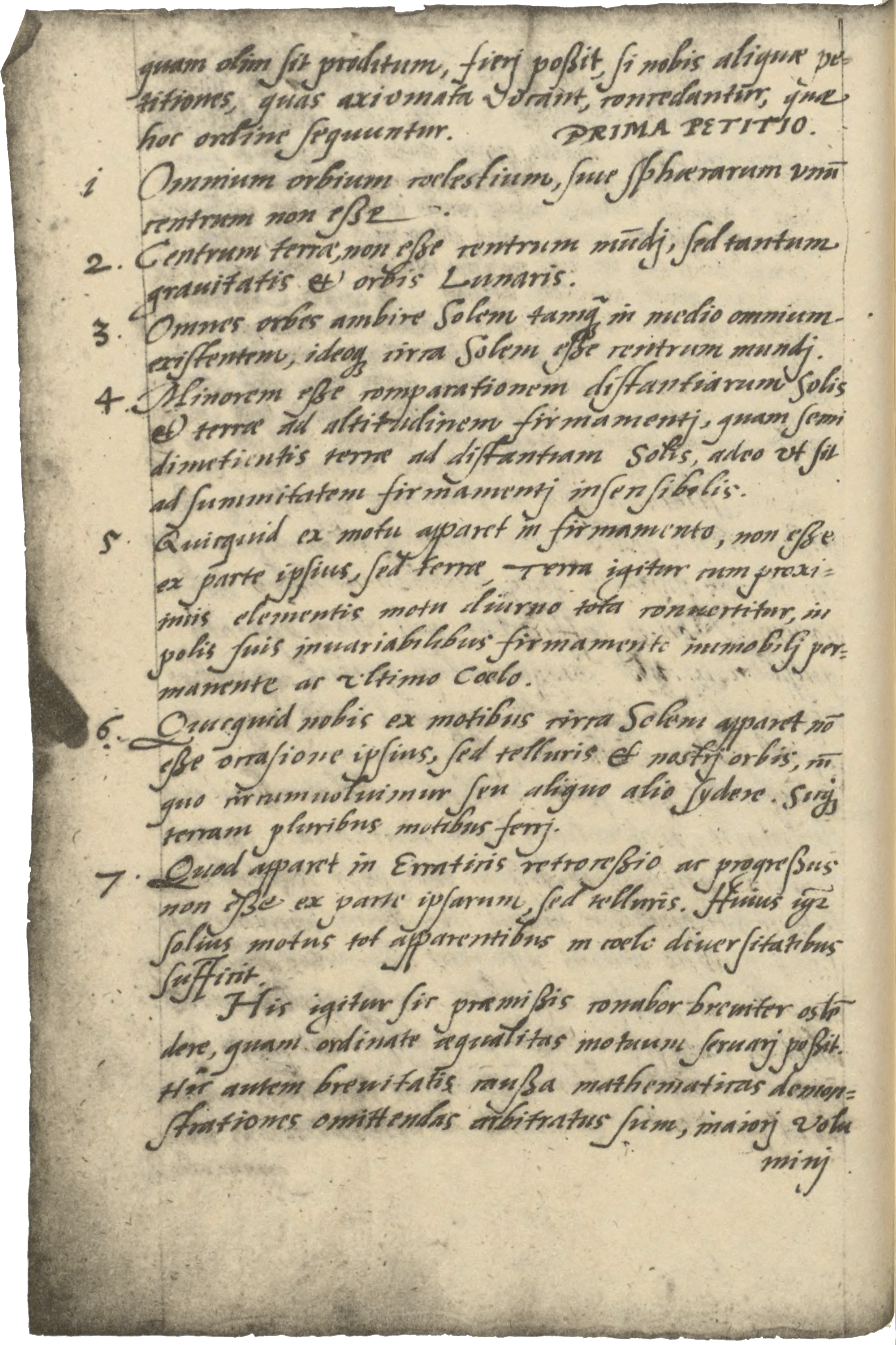 Blatt 2 des Stockholmer Manuskriptes von Nicolai Copernici de hypothesibus motuum coelestium a se constitutis commentariolus.